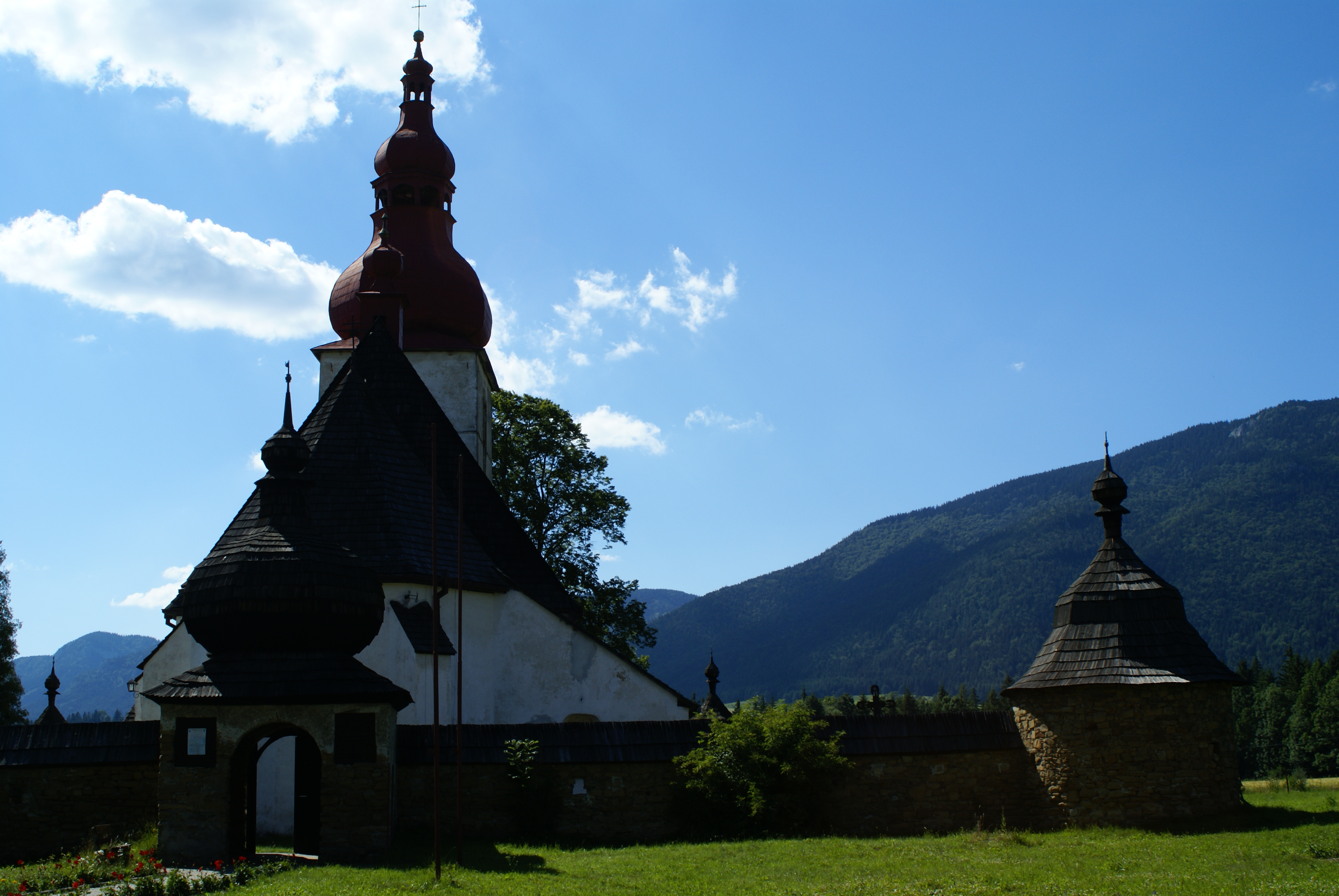 Catholic Church, Liptovské Matiašovce, Slovakia